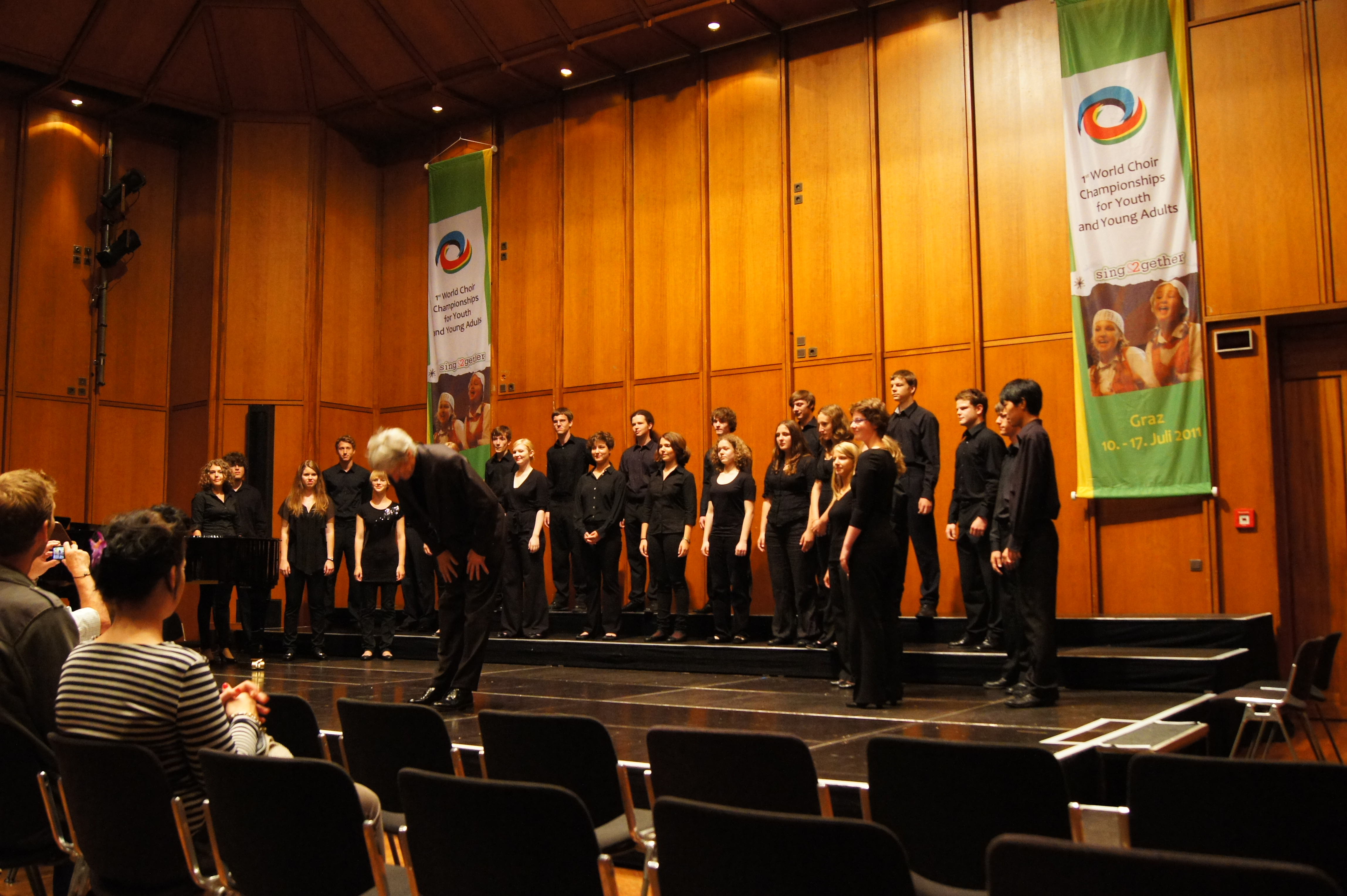 Der Kammerchor des Kurfürst-Friedrich-Gymnasiums Heidelberg bei den 1. Jugendchorweltmeisterschaften in Graz 2011. Der Chor gewann in der Kategorie "Gemischte Jungedchöre".